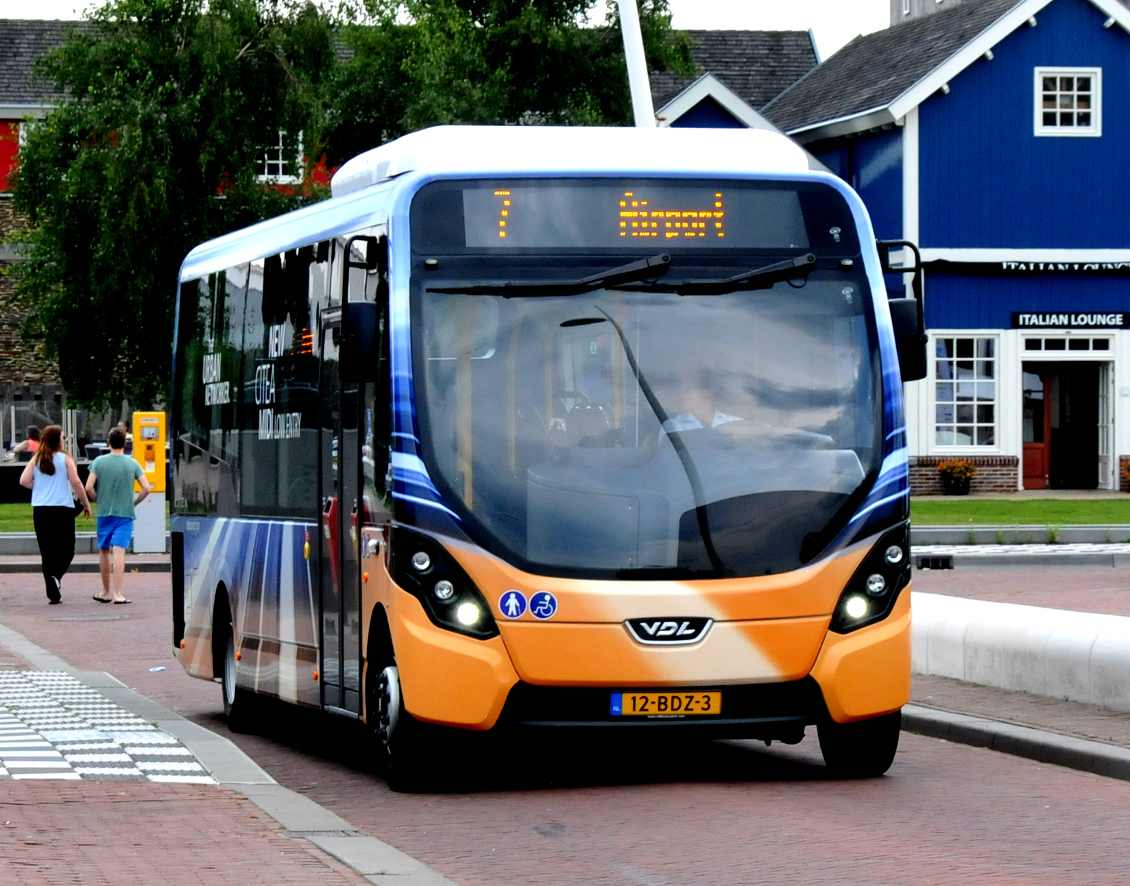 VDL bus van het type Citea MLE 88.180 die van juni 2014 t/m september 2014 bij Arriva te Lelystad werd getest. Deze bus is gebouwd in samenwerking met Wrightbus in Ballymena, Noord-Ierland.